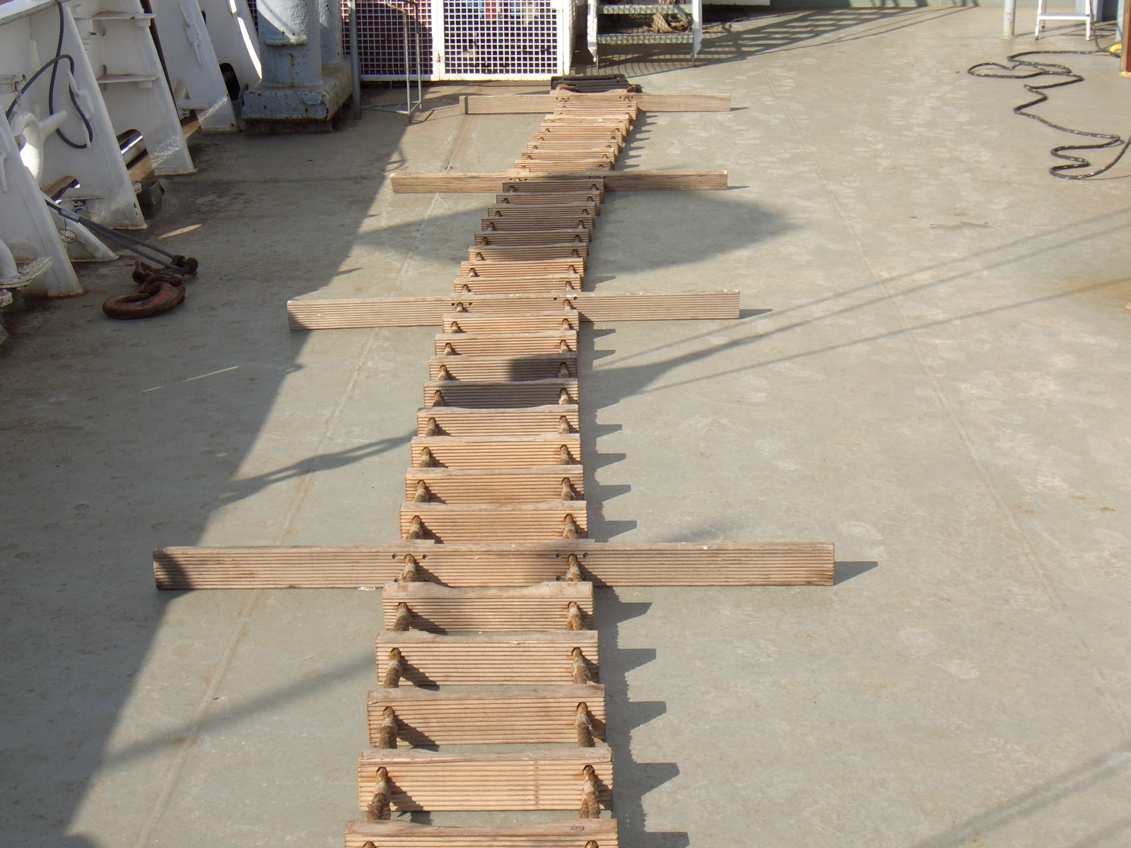 Jakobsleiter auf einem Schiffsdeck liegend.